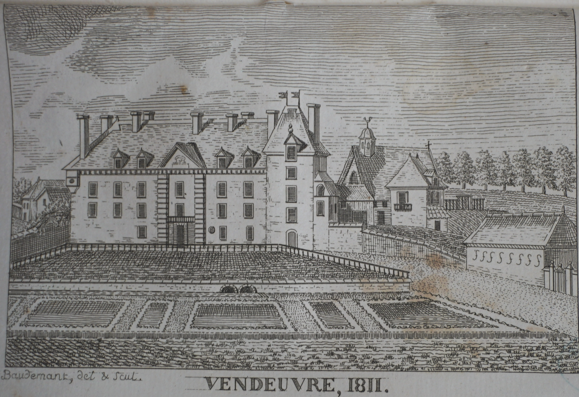 Vue ancienne du chateau, publiée en 1812 par Sainton.